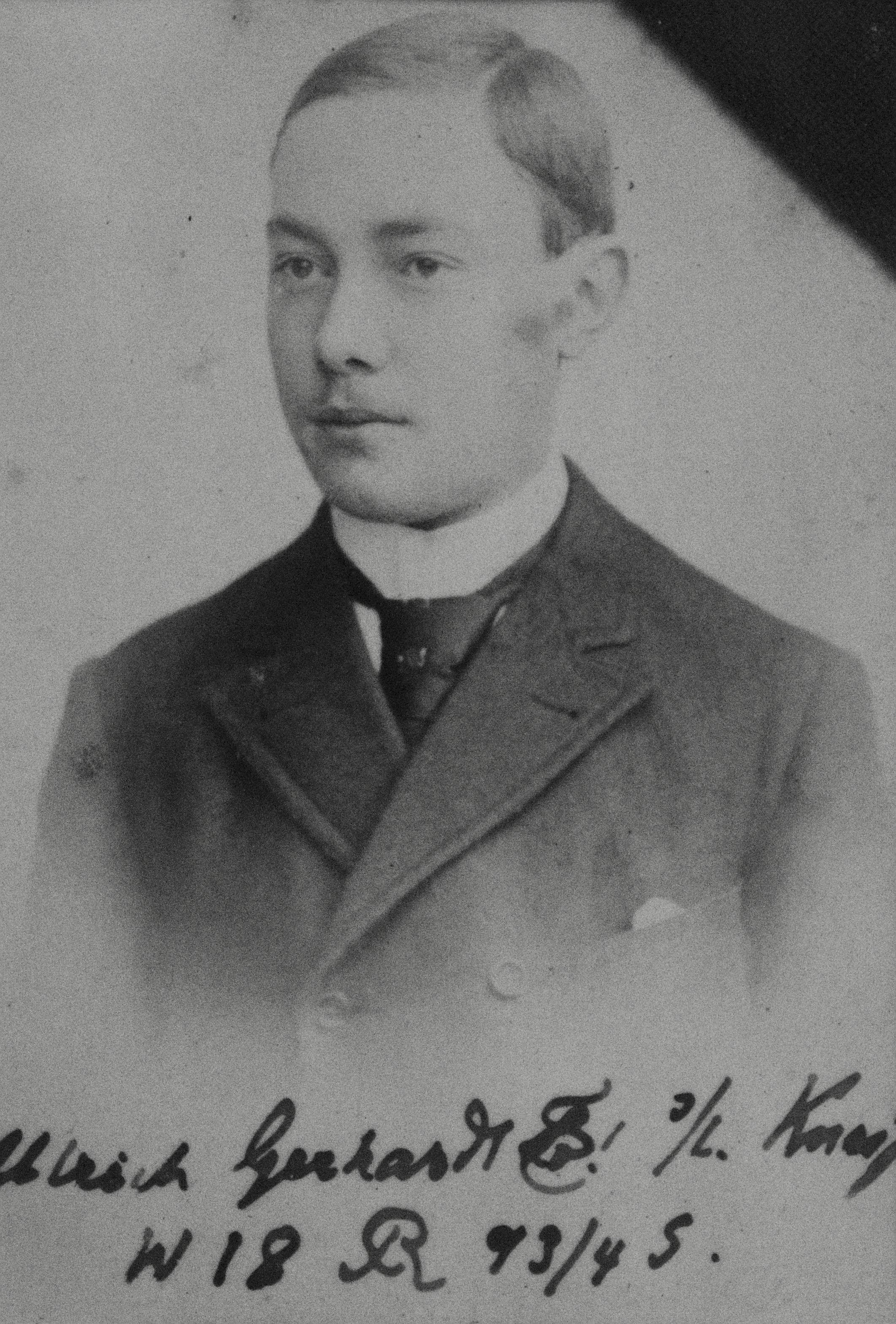 Fotografie von Ulrich Gerhardt als Mitglied der Studentenverbindung Leonensia. Unten befindet sich der Zirkel der Verbindung Leonensia. Standort der Fotografie: Ahnengalerie im Conventssaal der Verbindung Leonensia